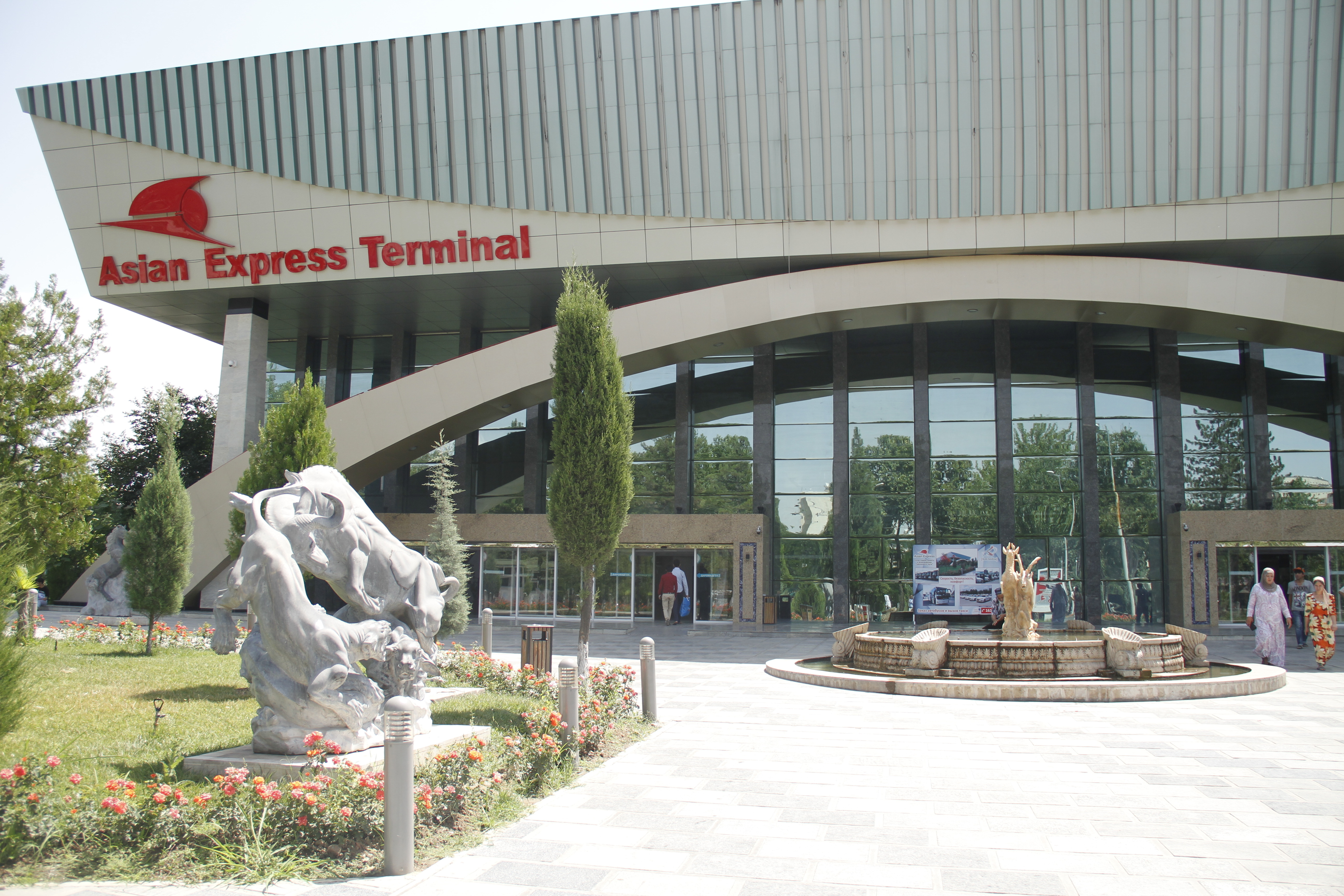 Тоҷикӣ: Азия Экспресс Терминал-6 (Автовокзал)